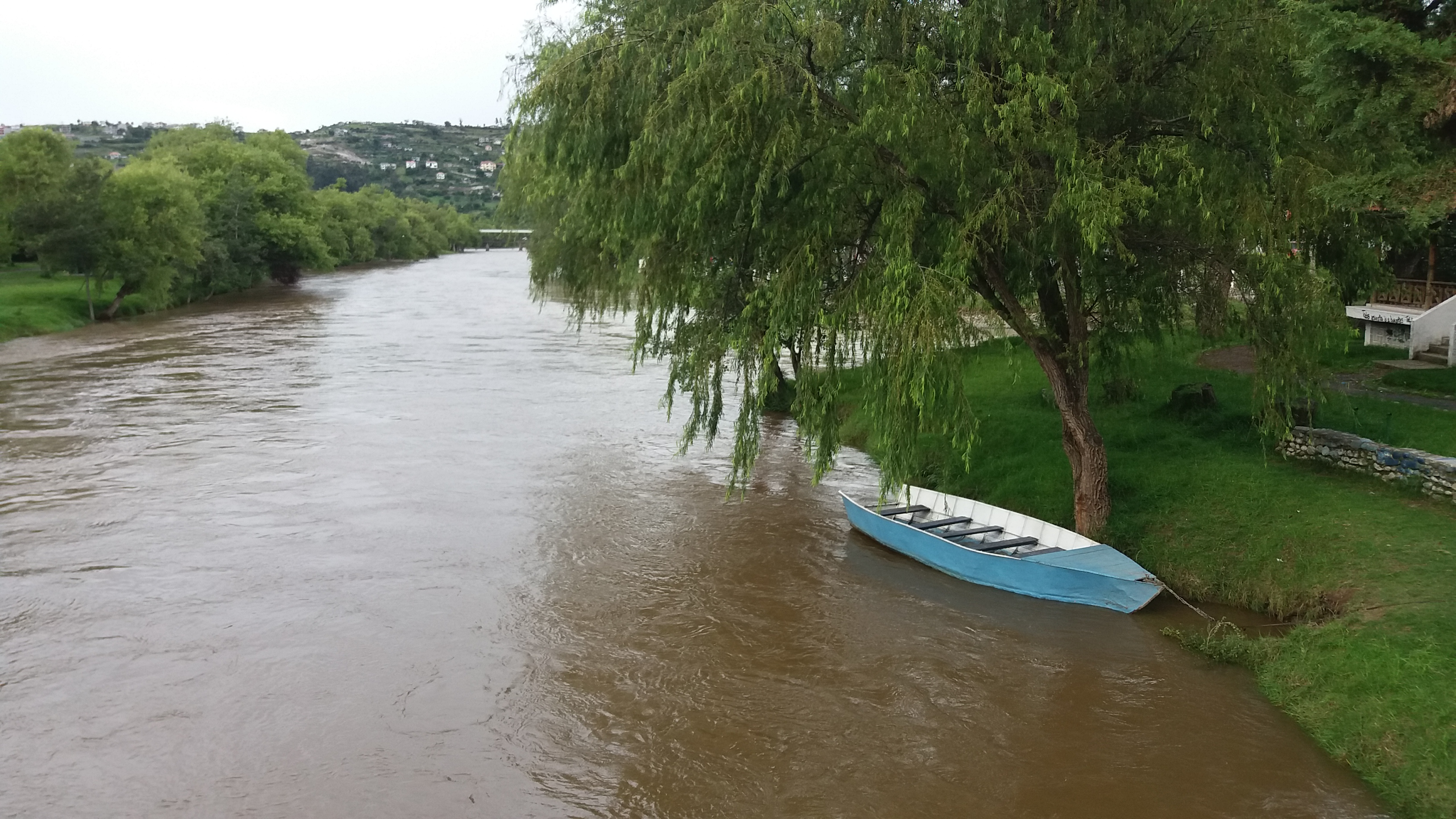 Río Santa Bárbara, cerca de la unión con el San Francisco, en Gualaceo.